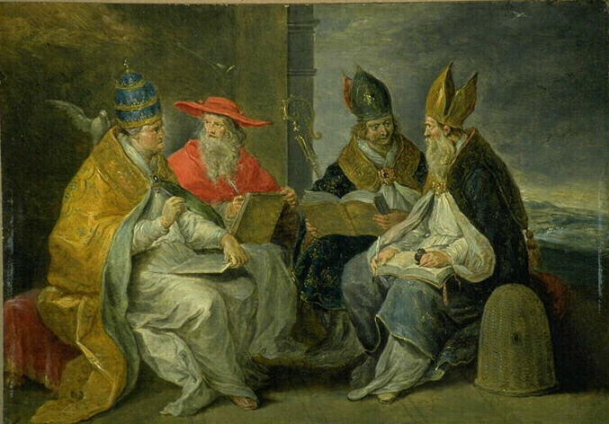 Les quatre Docteurs de l'église